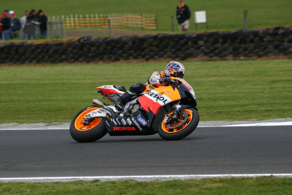 Dani Pedrosa at Philip Island MotoGP